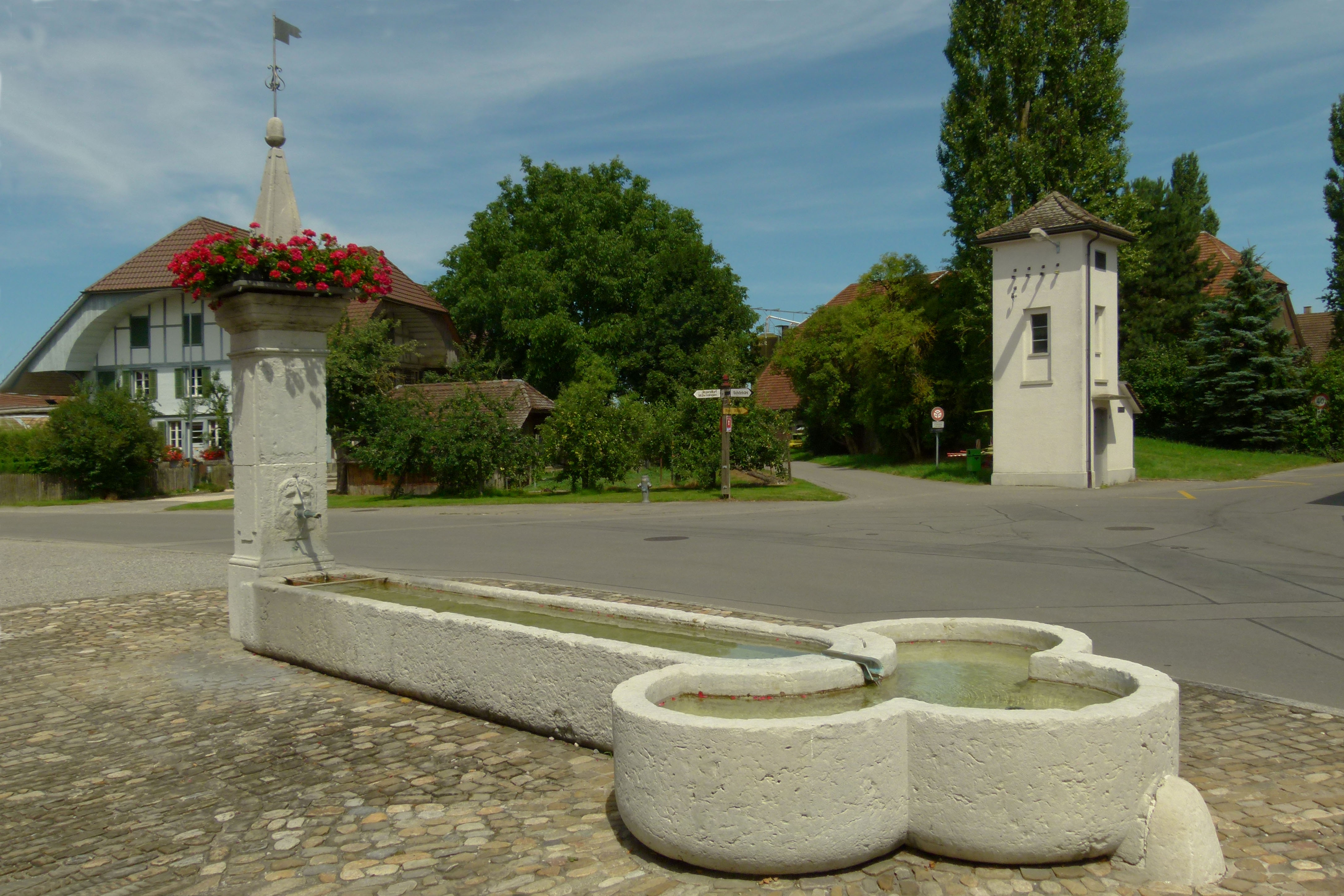 Dorfbrunnen in Mattstetten CH. Trog von 5,5m Länge und 1,0m Breite mit Dreipass-(Kleeblatt)förmigem Ansatztrog. Der Brunnenstock ist ca. 60cm im Quadrat und über 4m hoch. Die Tröge und der Brunnenstock sind je aus einem Block Solothurner Marmor gehauen. Jahr der Entstehung 1780 gem. Inschrift am Stock.